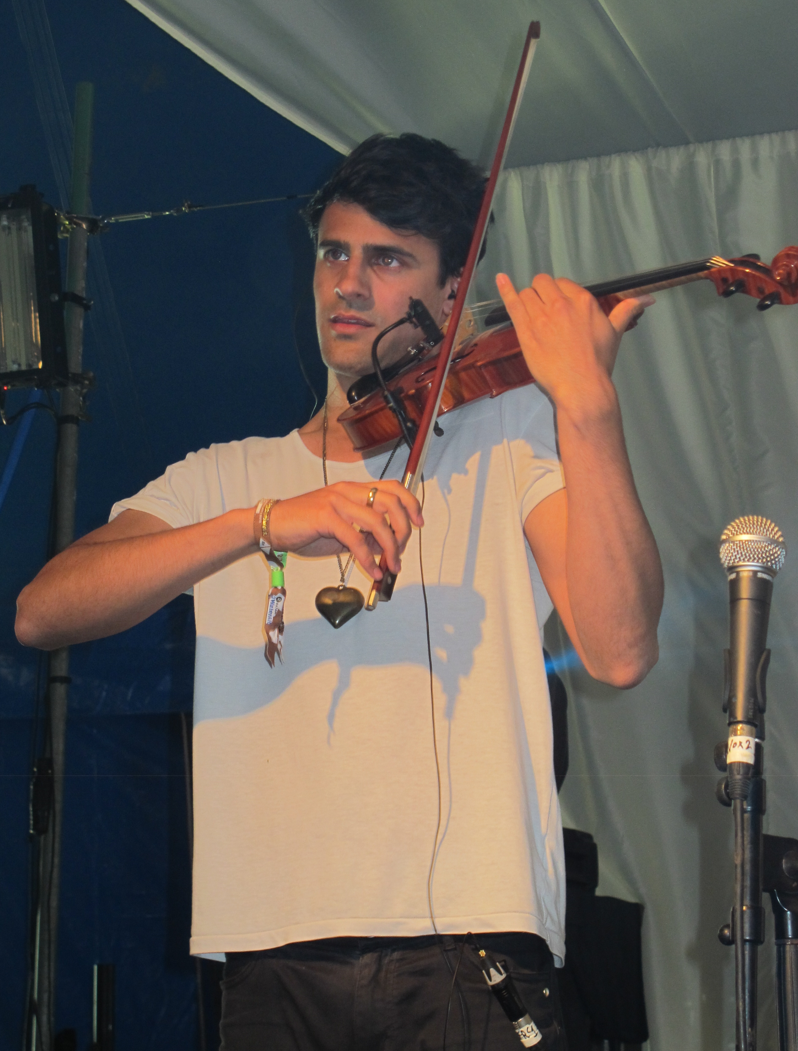 Milan Neil Amin-Smith le 29 juin 2013.